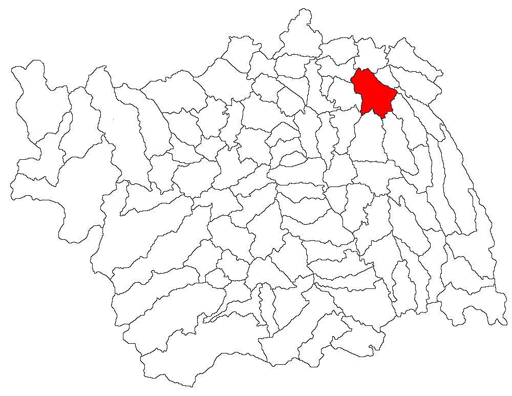 Categorie:Hărţi ale judeţului Bacău